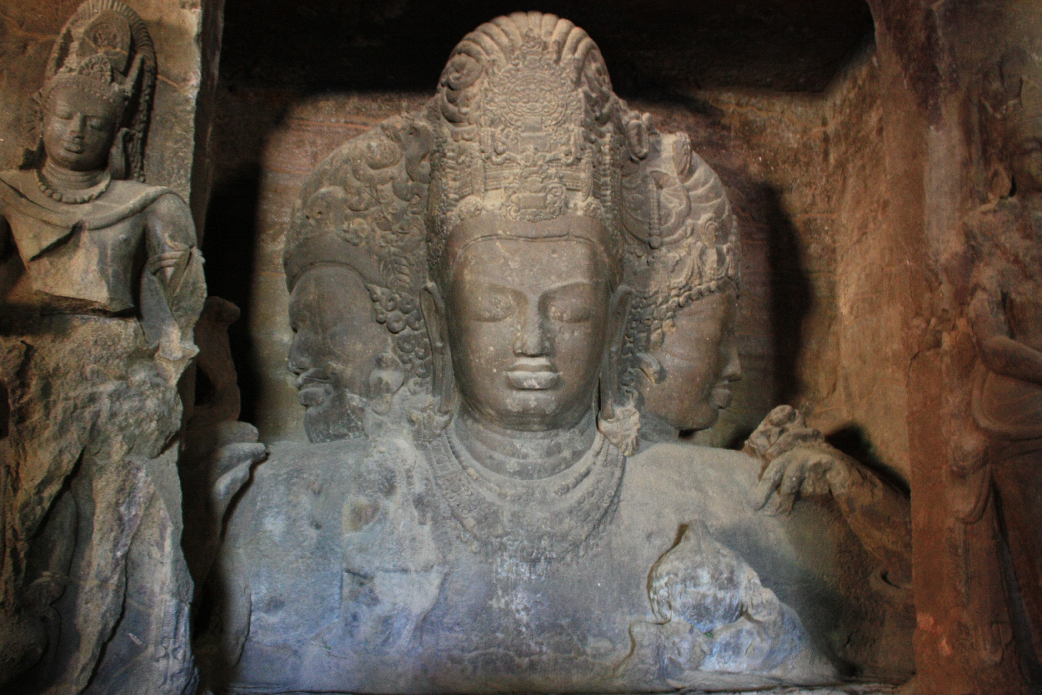 Trimurti Elephanta Caves